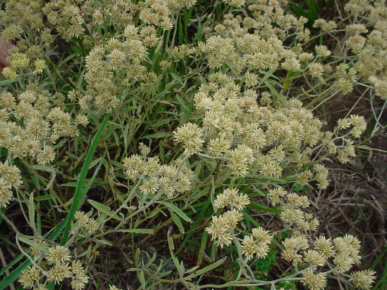 Arbusto de macela, encontrado na Região Sul do Brasil